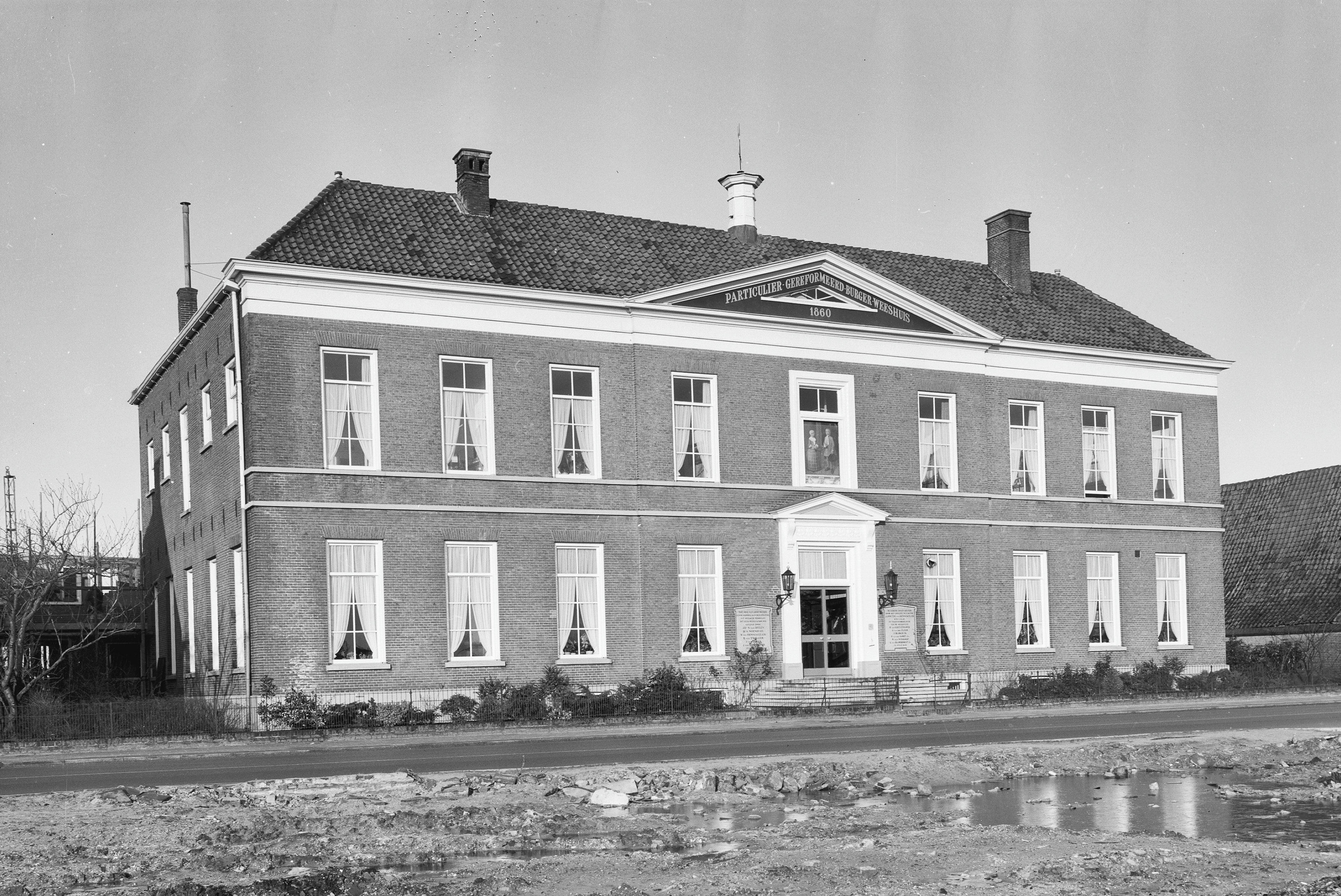 VOORMALIG GEREFORMEERD WEESHUIS: aanzicht